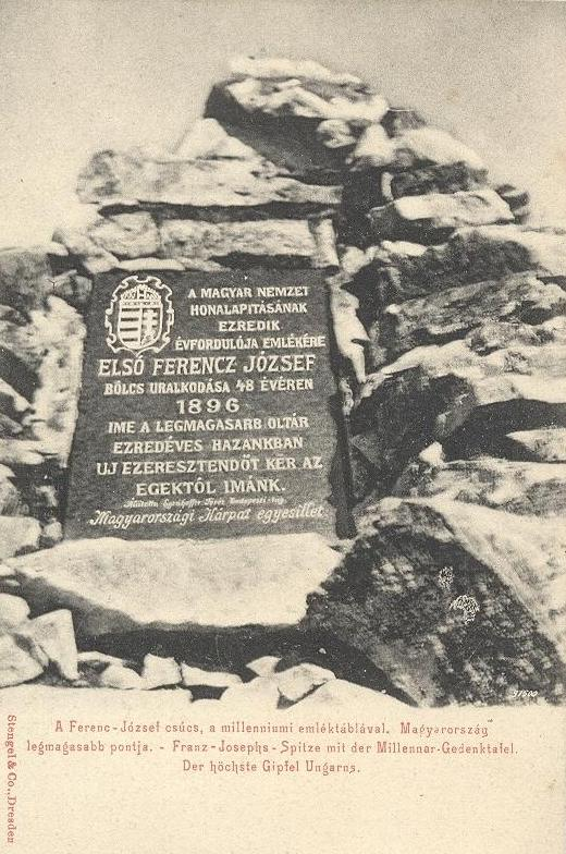 Tátra - Gerlachfalvi csúcs (1905) Ferenc József emléktábla